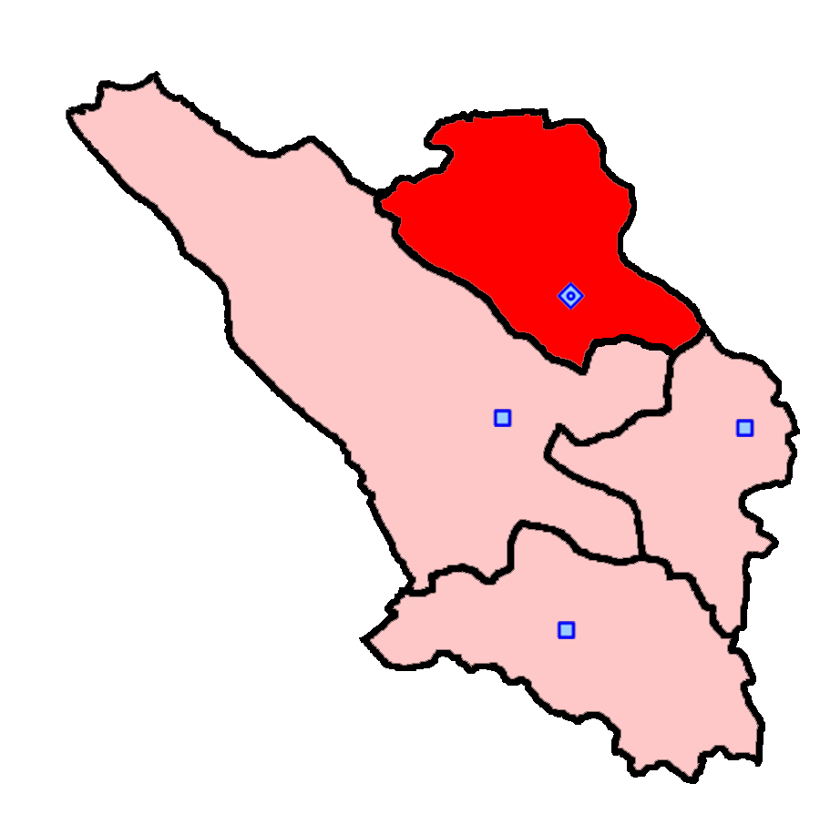 حوزهٔ انتخاباتی شهرکرد و سامان و بن برای انتخابات مجلس شورای اسلامی